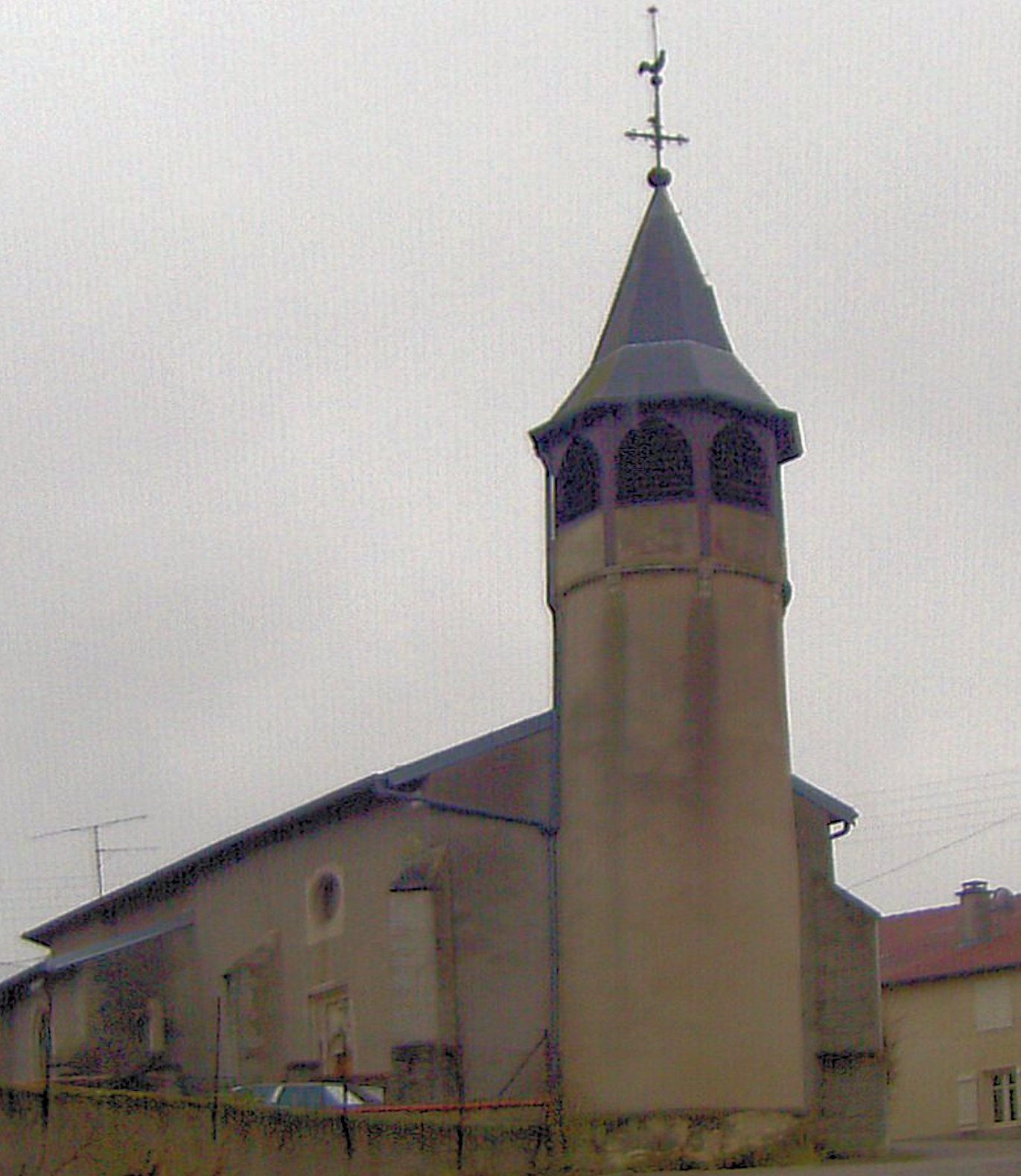 L'église Saint-Étienne à Voinémont